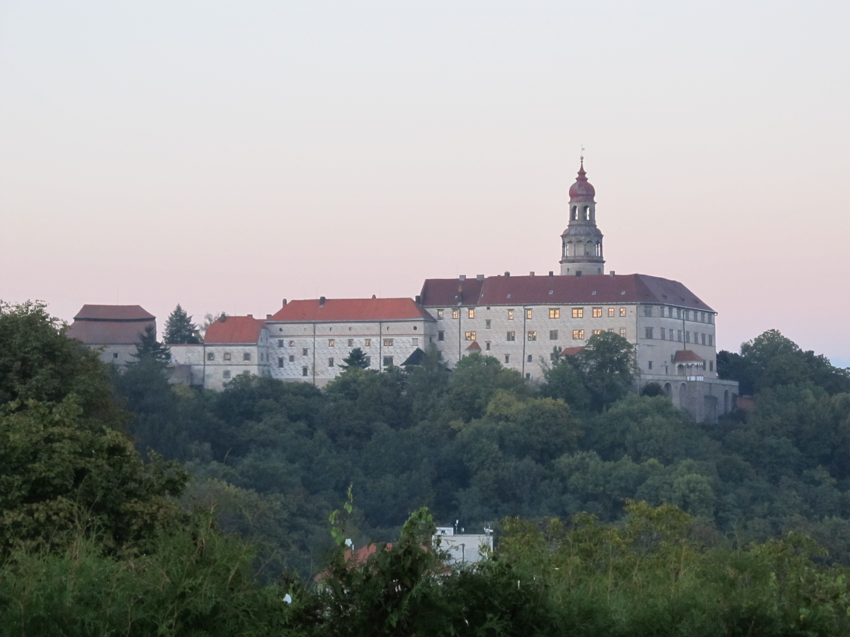 Zámek Náchod, Zámek 1282, Náchod